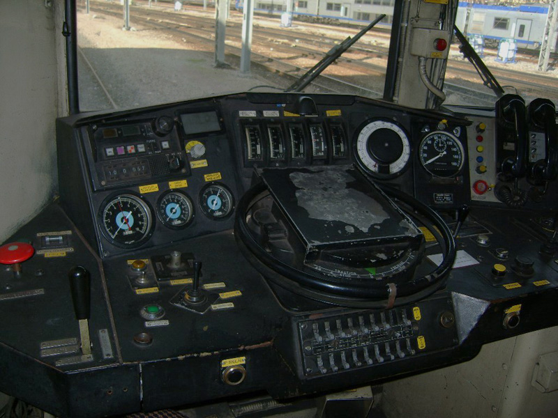 Vue sur le pupitre de la cabine d'une locomotive BB25200.